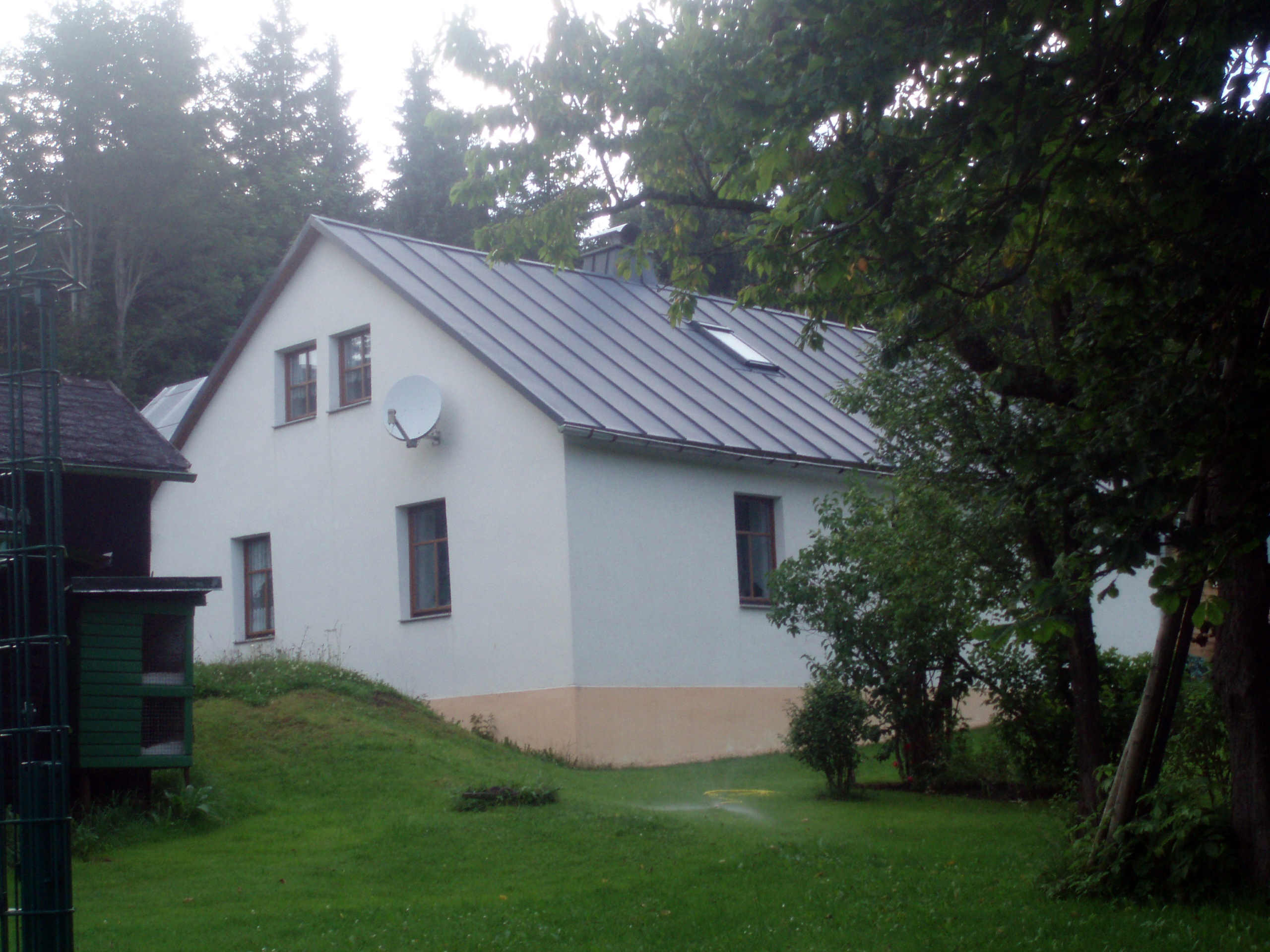 Huthaus Gabe Gottes in Johanngeorgenstadt.